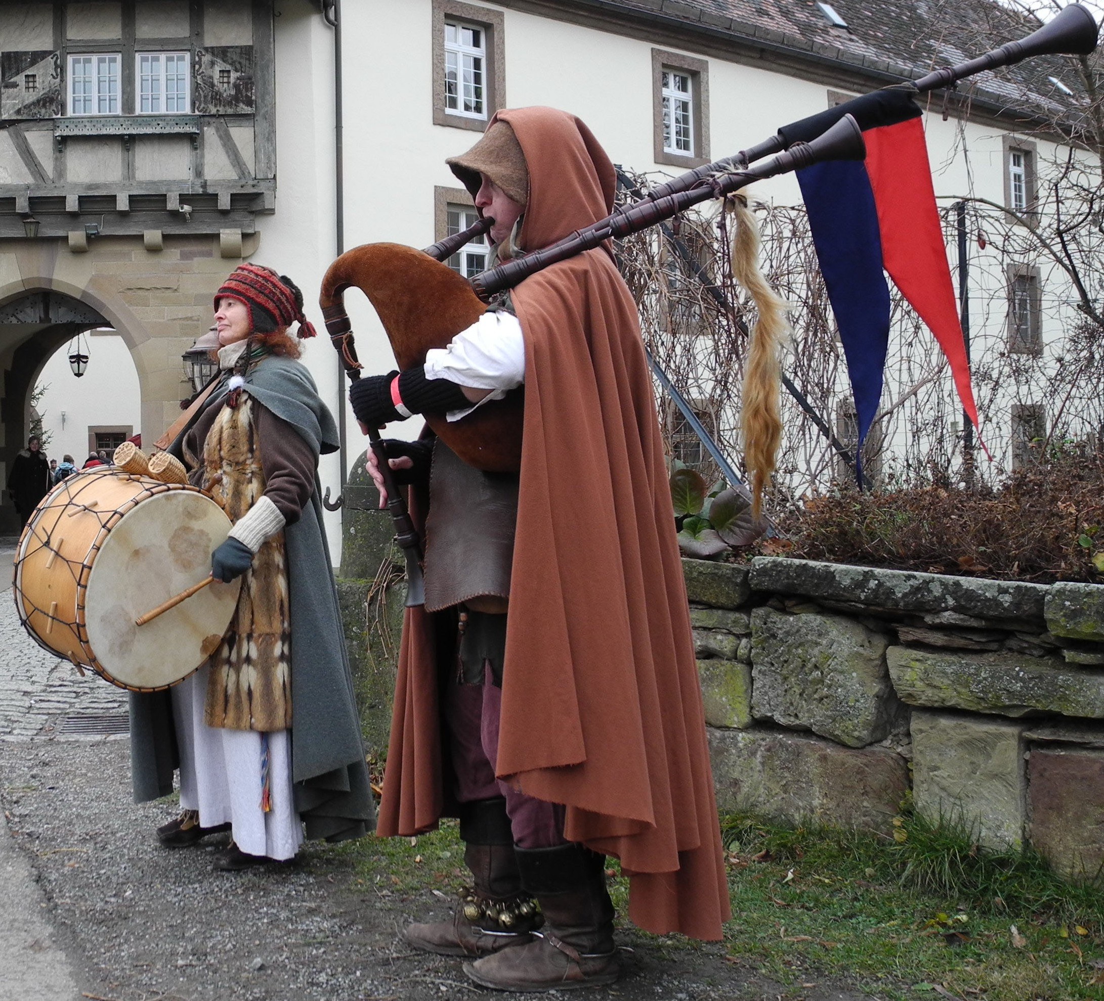 Wünnespil in aktueller Besetzung 2011